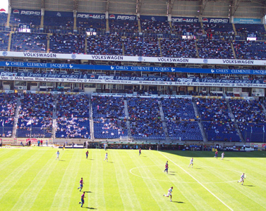 Estadio Cuauhtémoc, Puebla, Mexico. Picture taken by Jose Alonso, 2004 Image history at en: (del) (cur) 00:37, 12 March 2005 . . Jeralonso (143747 bytes) (Estadio Cuauhtémoc, Puebla, Mexico)